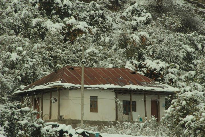 Ahoudasht-Sari-Mazandaran-Iran